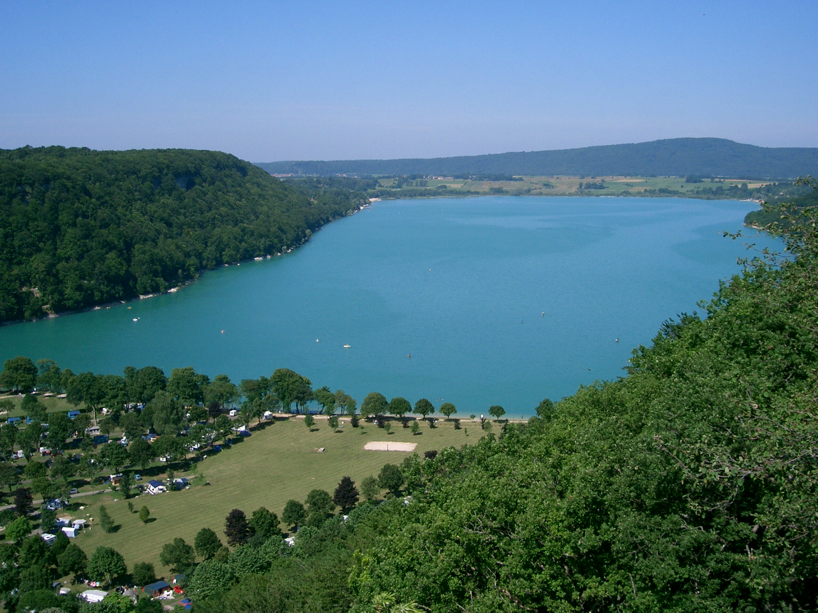 Lac de Chalain vu des falaises de Fontenu - France (Jura). self made PRA